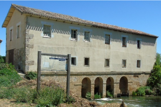 San Llorente (Burgos), fabrica en el Canal de Castilla